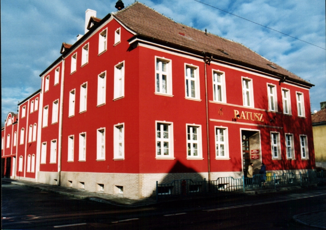 BARLINEK